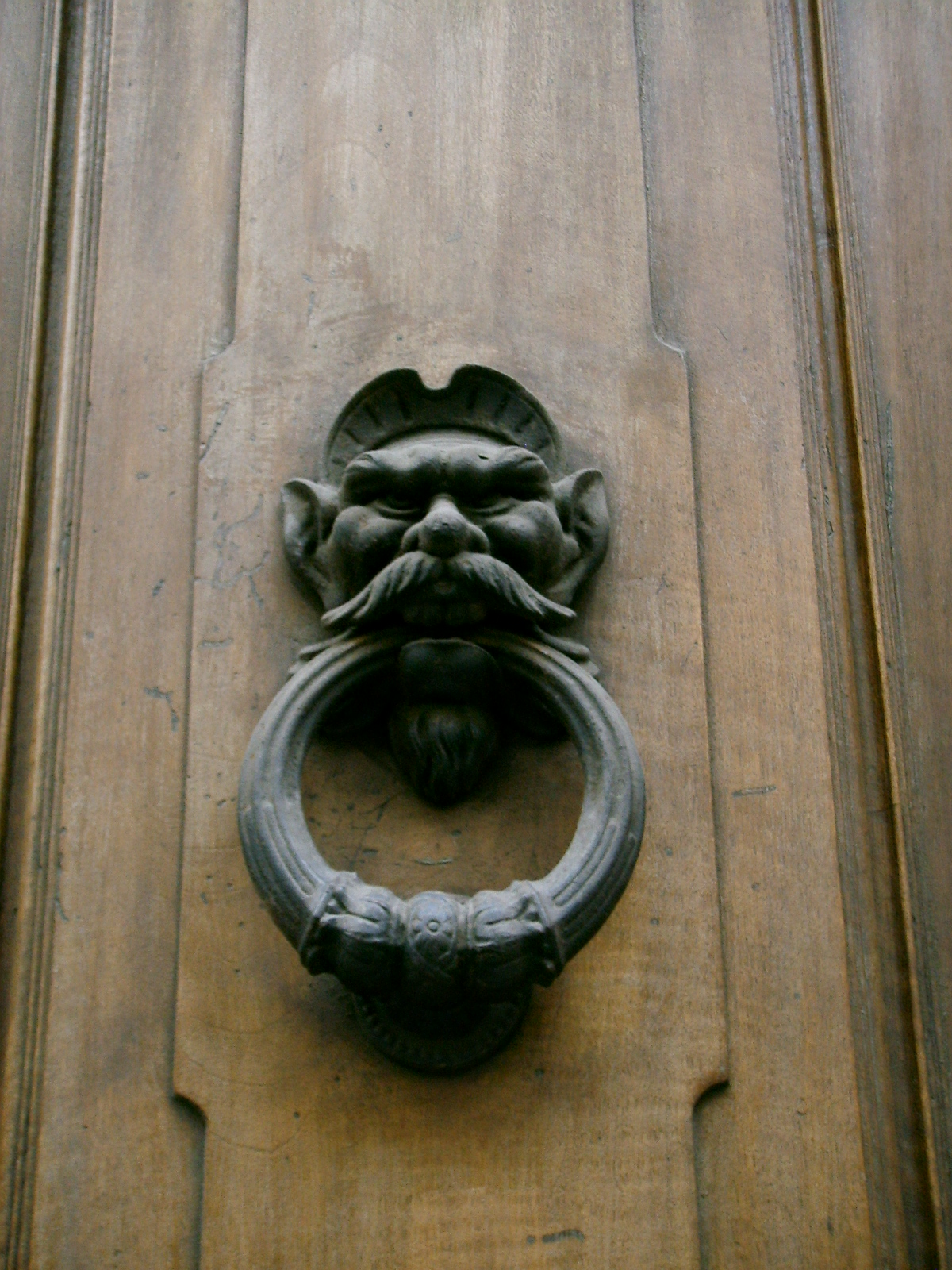 Palazzo Bartolommei, dettaglio